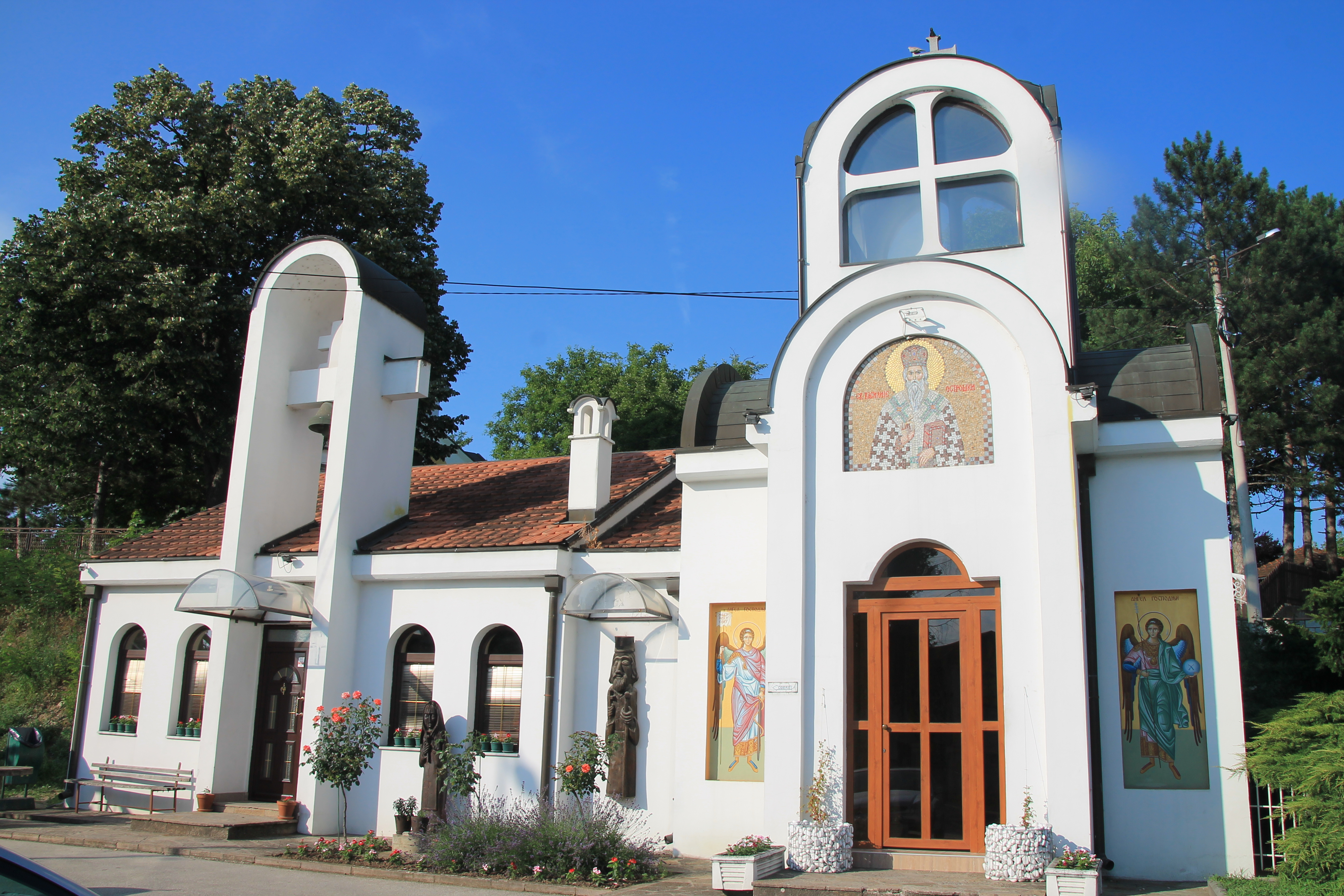 Crkva Sv. Vasilija Ostroškog (Preljina)